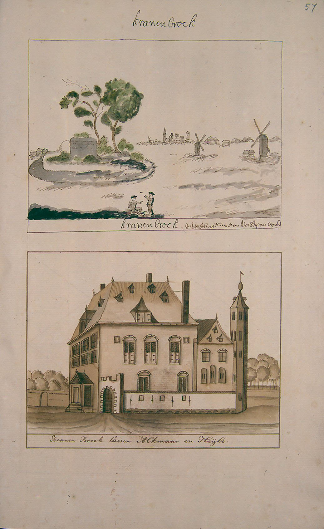 Beschrijving en Afbeelding der Steden, Dorpen, Gehugten Adelijke en andere Gebouwen in Westfriesland, Waterland, Kennermerland, en Aankleve van Dien, Dus beschreven en bij een Versamelt, Mitsgaders, in Alphabetise Ordre Geschikt door Andries Schoemaker